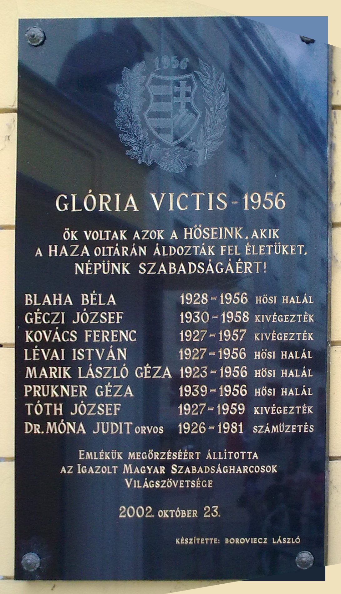 Blaha Béla emléktábla a Corvin mozi falán, Budapest VIII. Felirata: Gloria Victis – 1956 Ők voltak azok a hőseink, akik a haza oltárán áldozták fel életünket népünk szabadságáért! Blaha Béla, 1928–1956 hősi halál Géczi József, 1930–1958 kivégezték Kovács Ferenc, 1927–1957 kivégezték Lévai István, 1927–1957 hősi halál Marik László Géza, 1923–1956 hősi halál Prunker Géza, 1939–1956 hősi halál Tóth József, 1927–1959 kivégezték Dr. Móna Judit orvos, 1926–1981 száműzetés Emlékük megőrzéséért állította az Igazolt Magyar Szabadságharcosok Világszövetsége 2002. október 23. Készítette: Boroviecz László A fényképet 2014-06-21-n készítettem. Ugyanerről a tábláról másik fénykép File:GLÓRIA VICTIS - 1956 (3).JPG